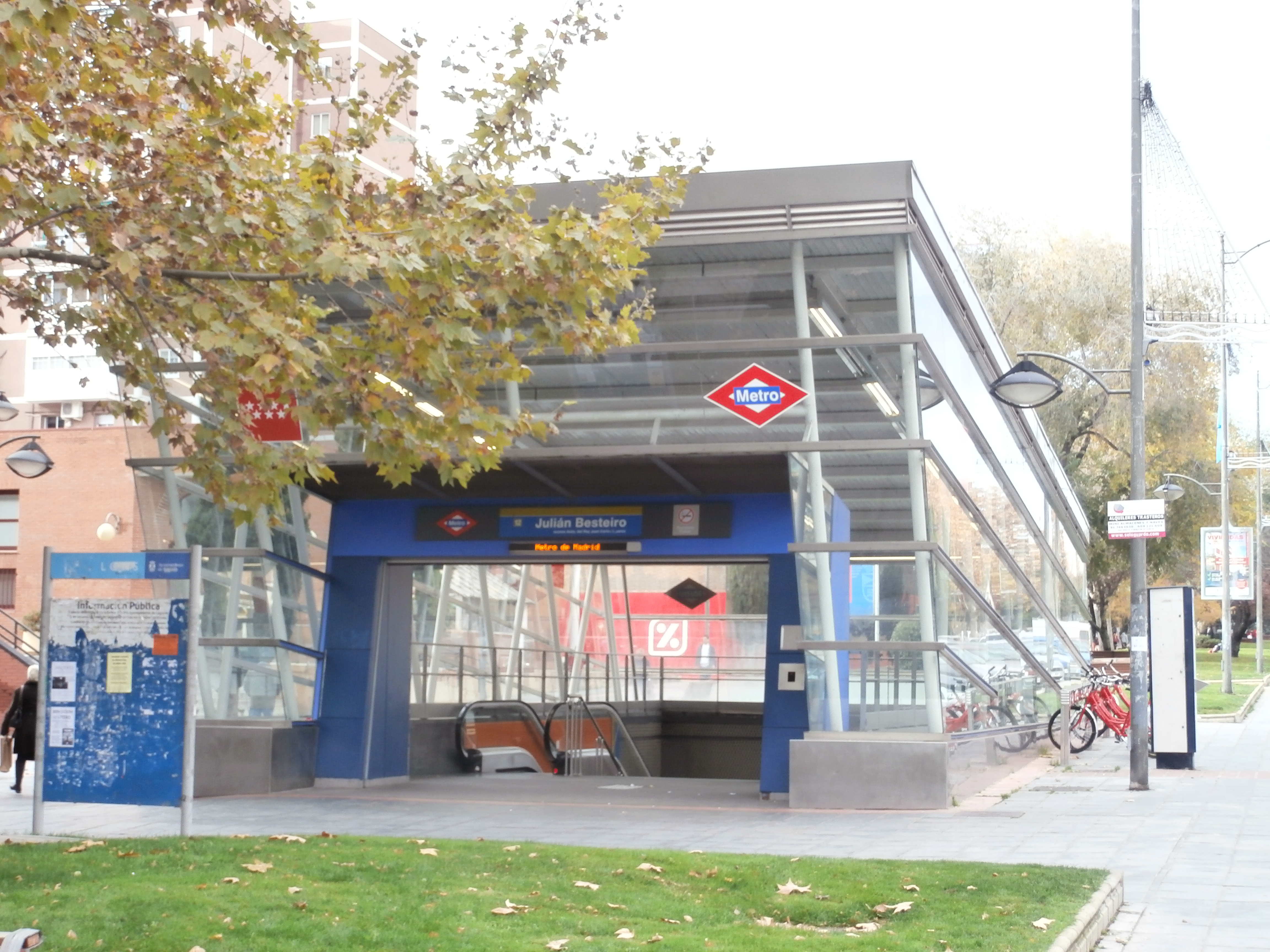 Boca de acceso de la estación de metro Julián Besteiro en Leganés.